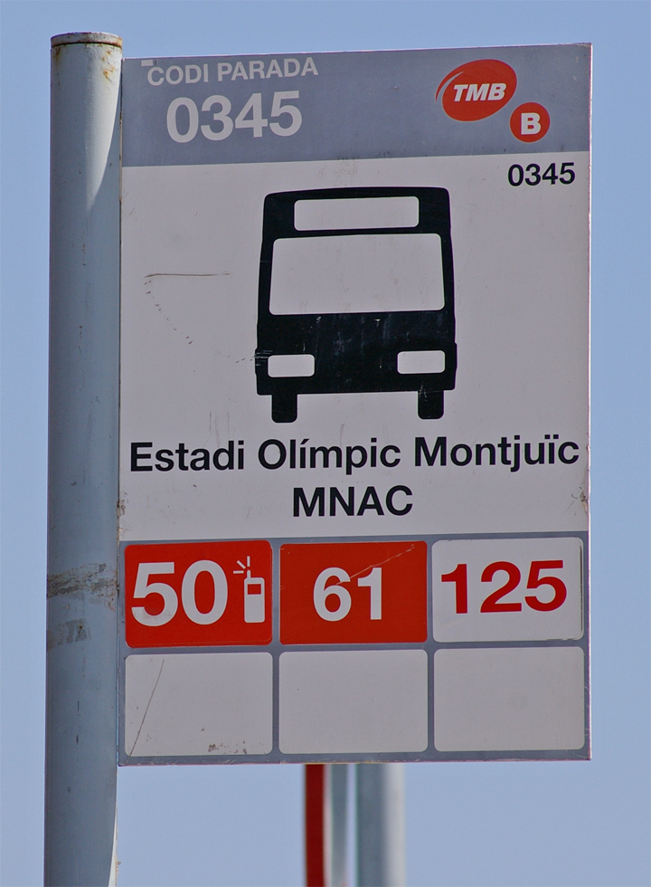 Parada TMB, Estadí Olímpic Lluís Companys, MNAC (Barcelona, Catalunya)